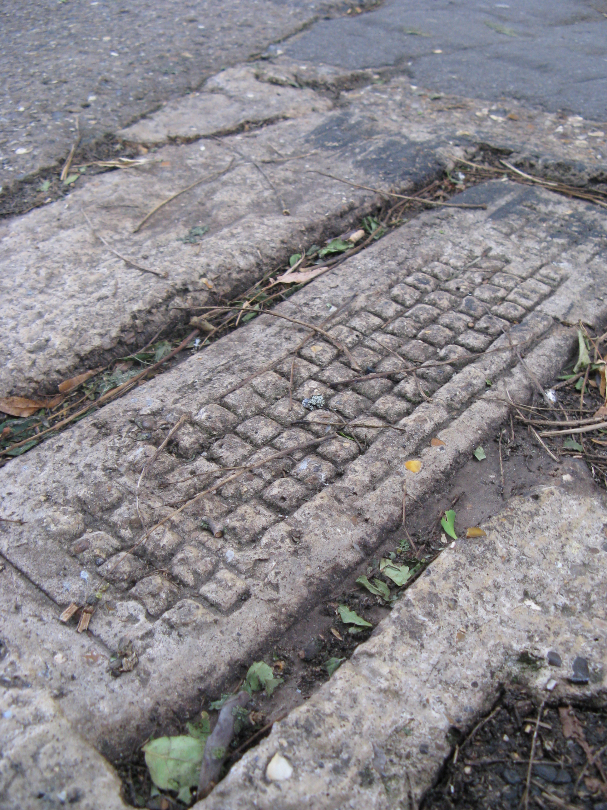 Pavement Keyboard